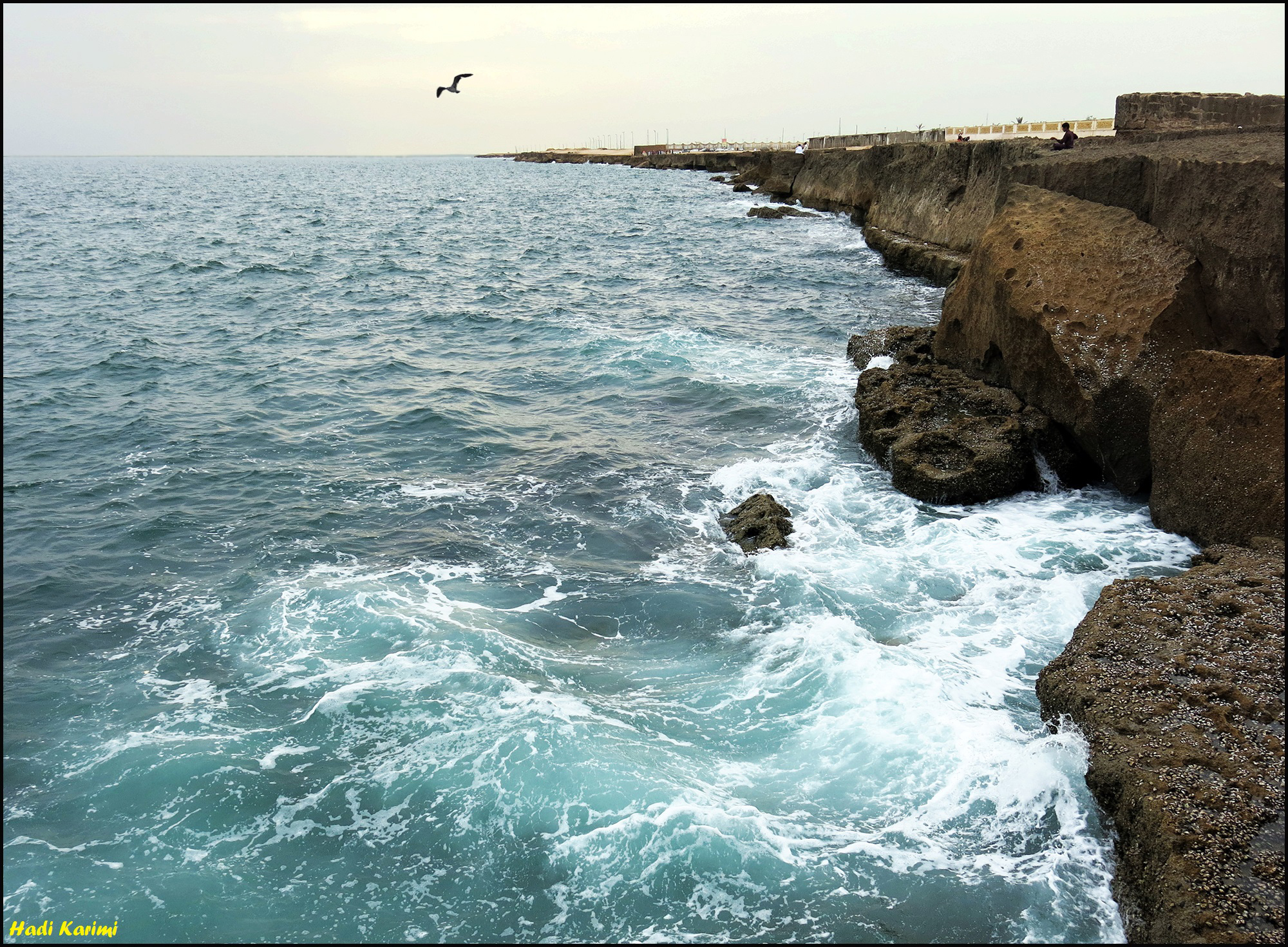 Daryabozorg- rock coast of Chabahar دریابزرگ، ساحل صخره‌ای چابهار